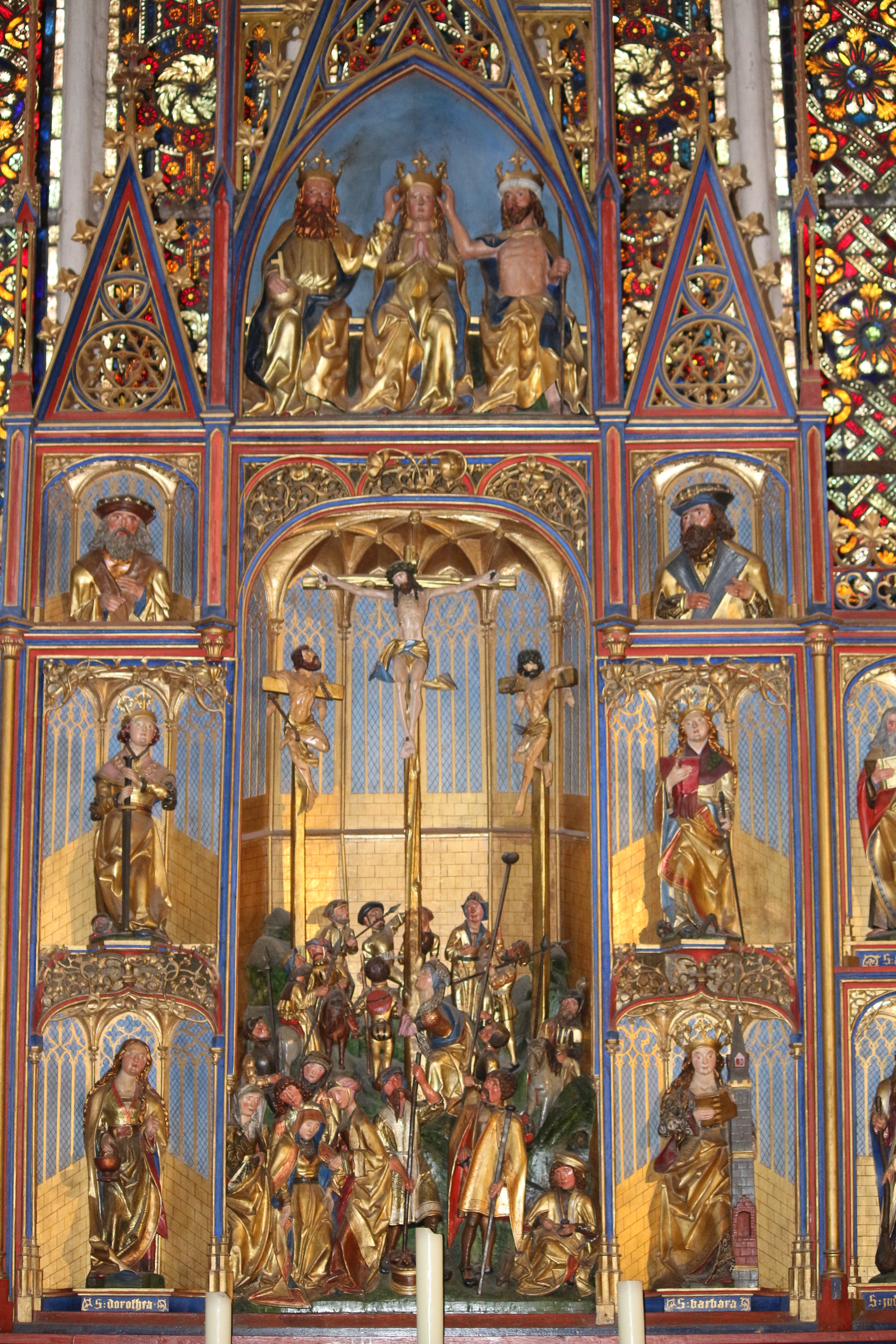 Mittelstück des Altars der Klosterkirche Rehna mit Kreuzigung Marienkrönung und den heiligen Jungfrauen